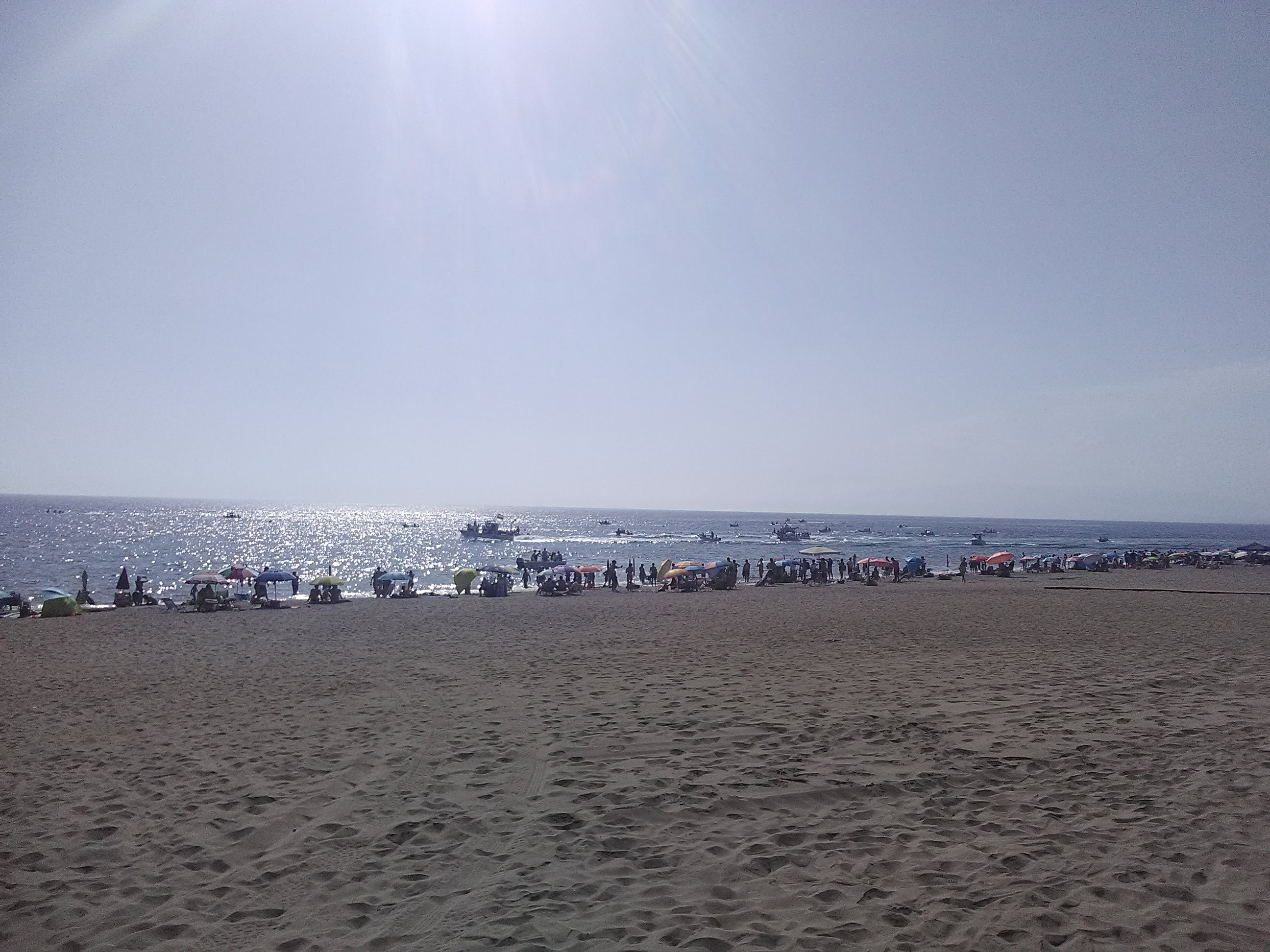 Procesión marinera que se celebra en Cabo de Gata por las fiestas